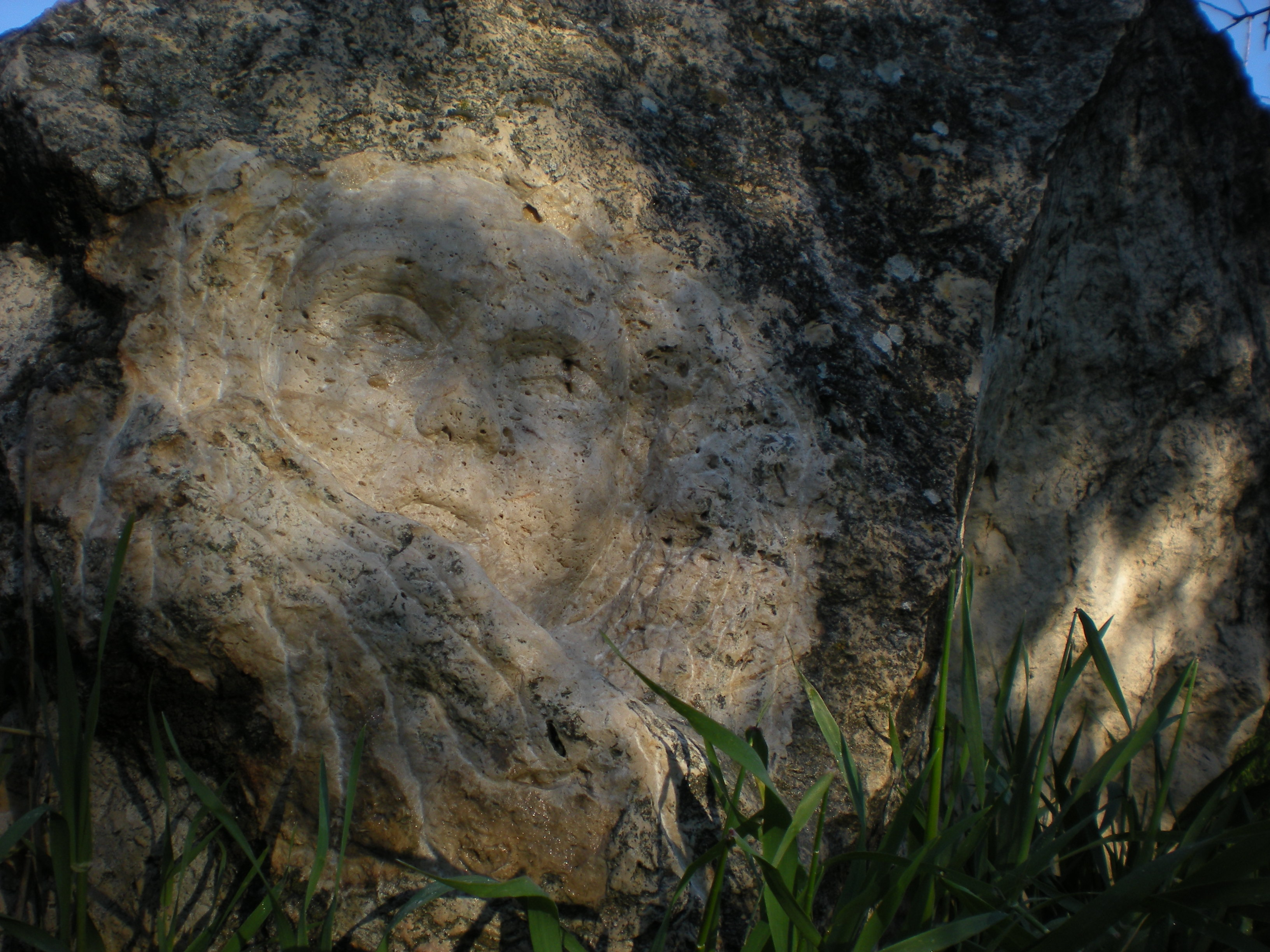 תקריב של הפסל "מצלבת"